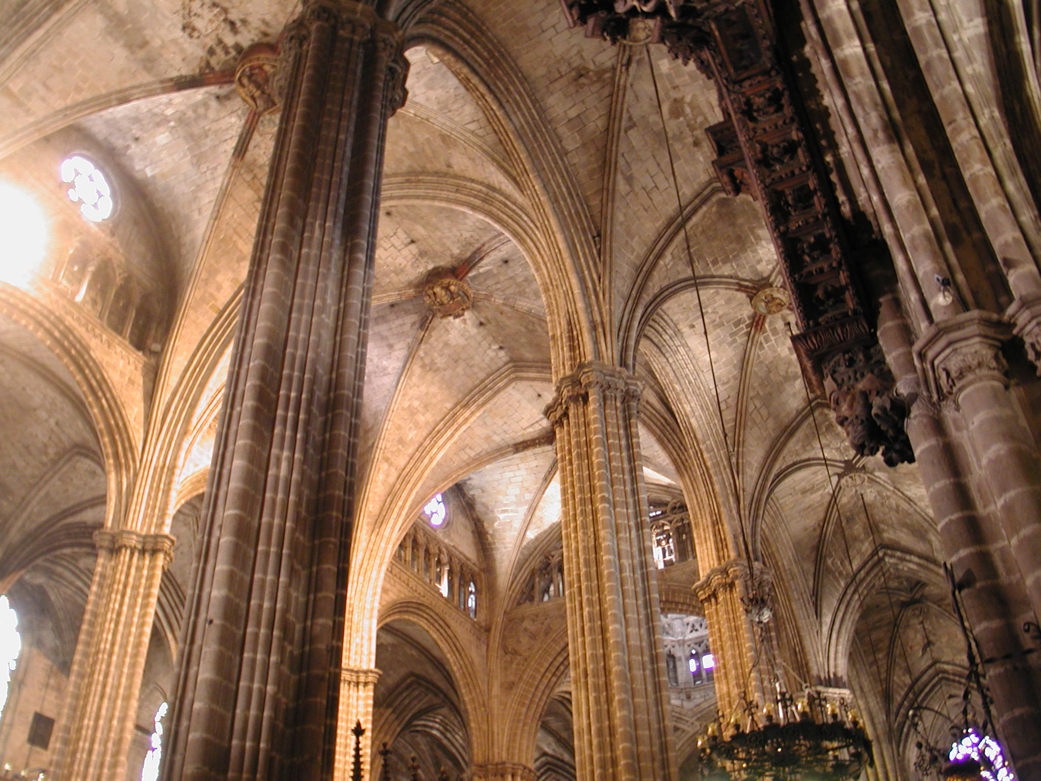 Catedral de Barcelona, interno Barcelona